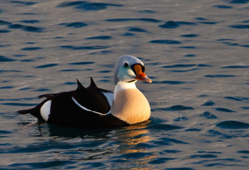 King Eider / Æðarkóngur Somateria spectabilis, Keflavik, Iceland